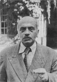 Foto en blanco y negro de Emilo Oribe